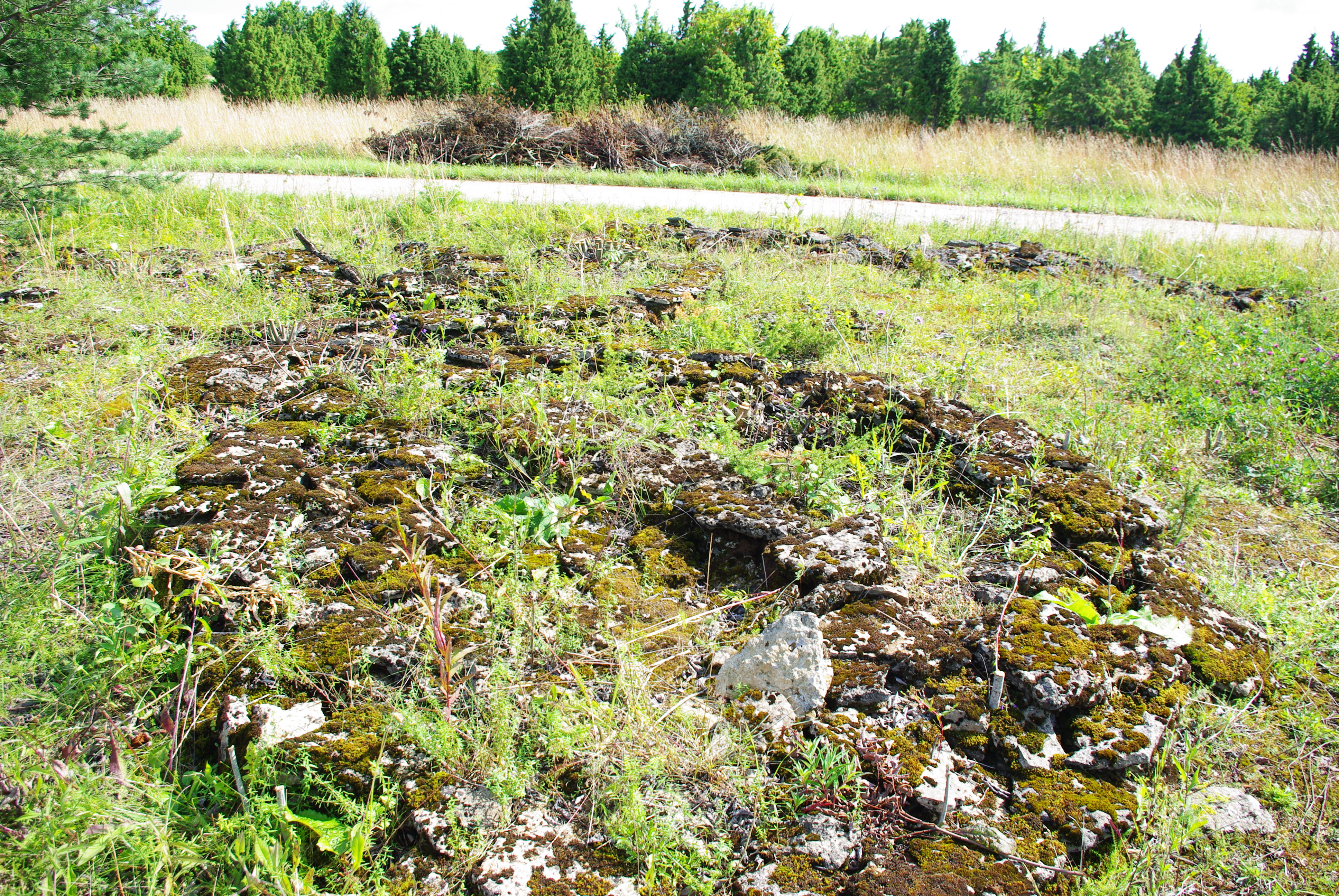 Kivikirstkalmed